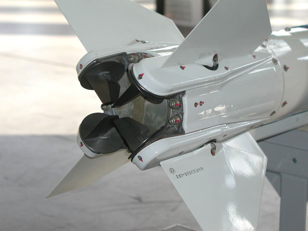 AAM-5の推進力偏向パドル部、アップロード者が航空自衛隊岐阜基地にて撮影